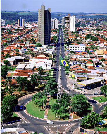 Imagem panorâmica de Bebedouro a partir da Praça do Maçon